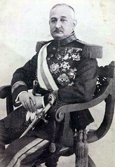 Retrato del Teniente General Laureado, D. Pío López Pozas.